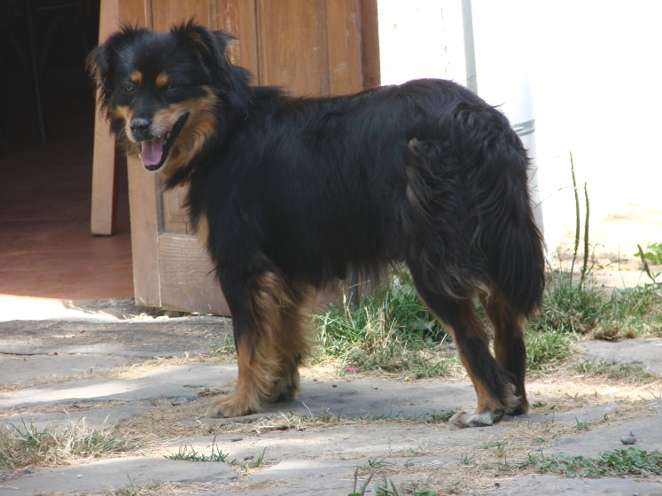 Perro de pastor del Pirineo Aragonés o "Can de Chira".